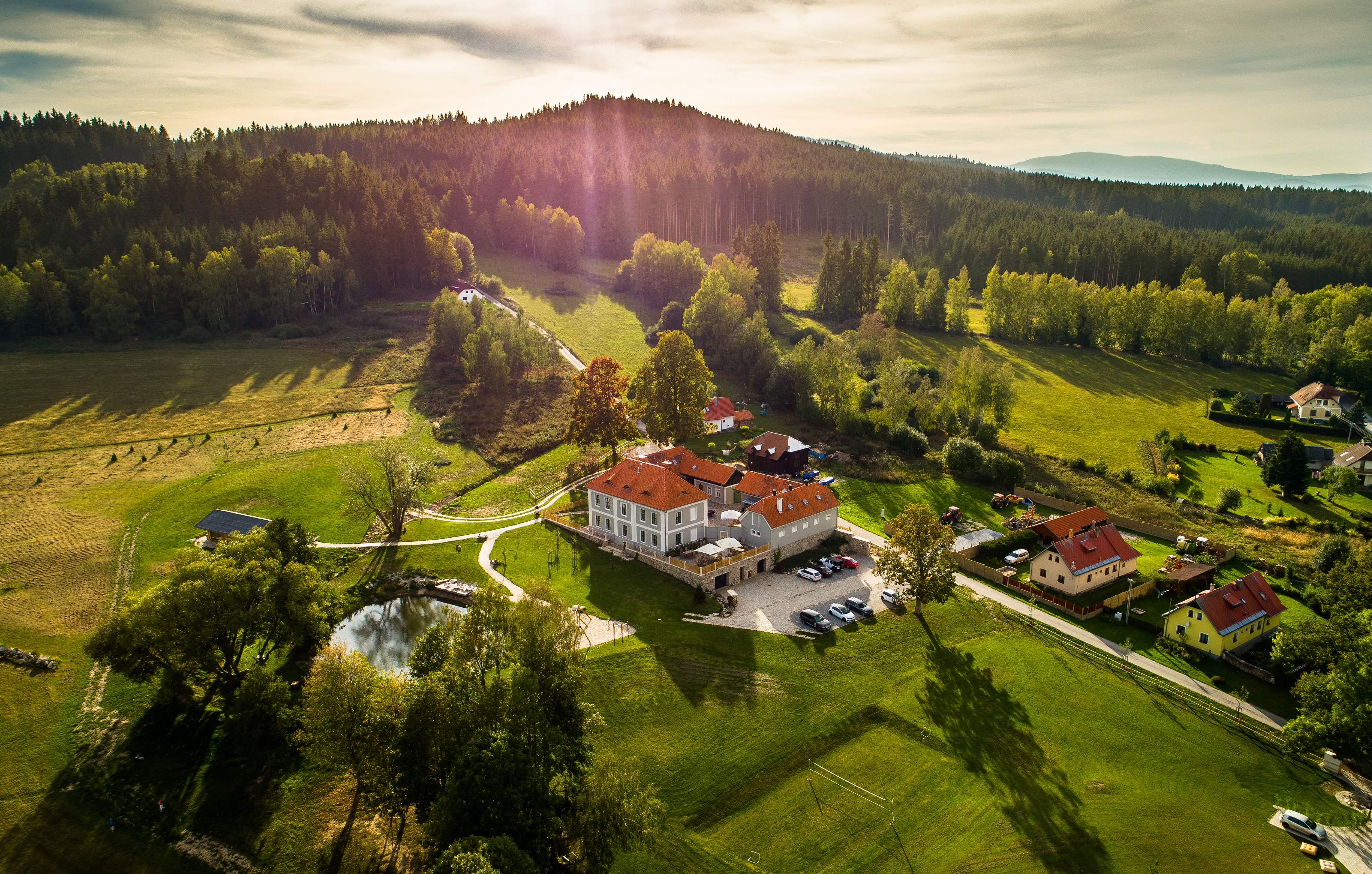 Bližší Lhota